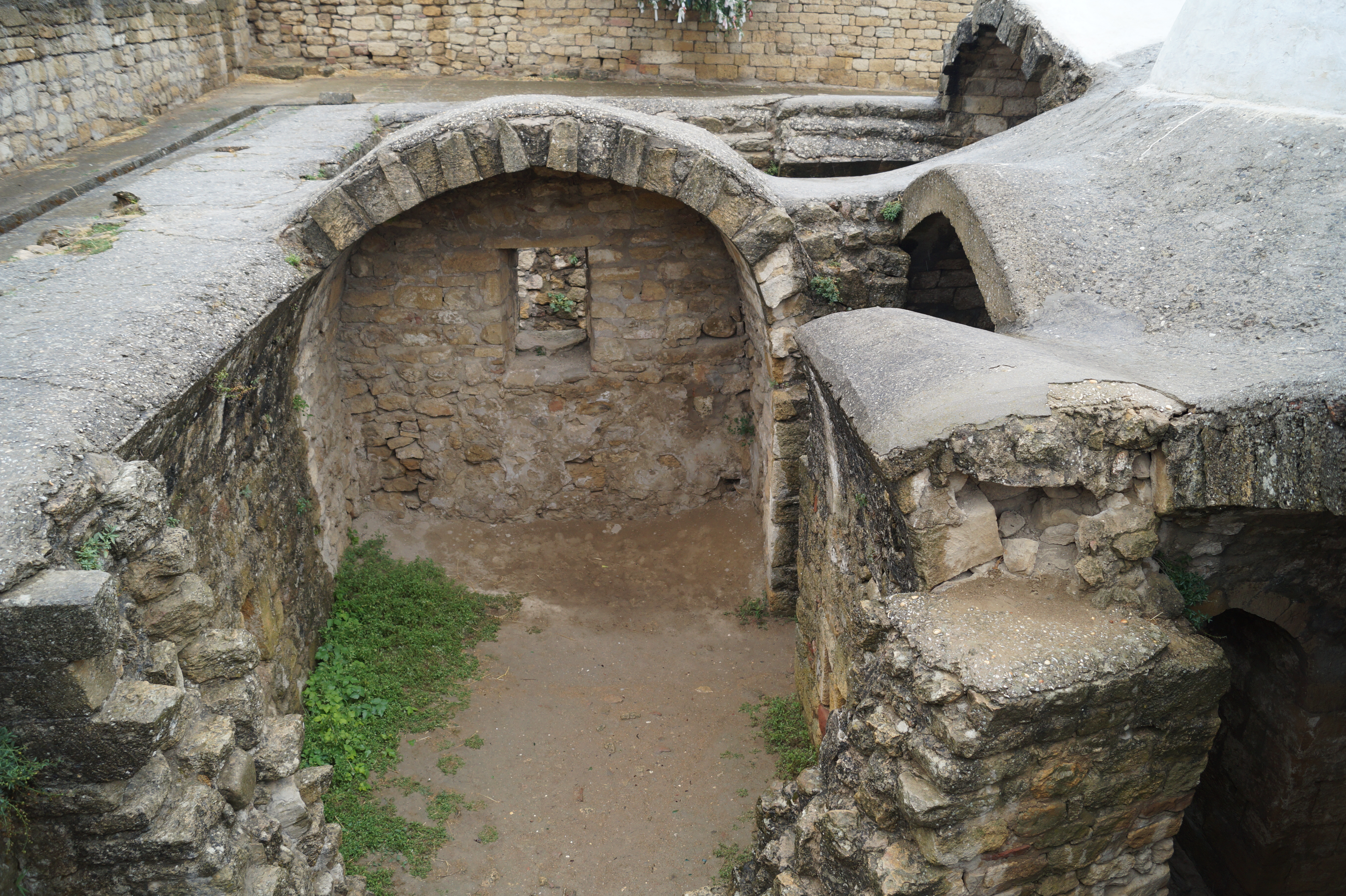 баня ханская: цитадель "Нарын-Кала", Дербент, Дагестан